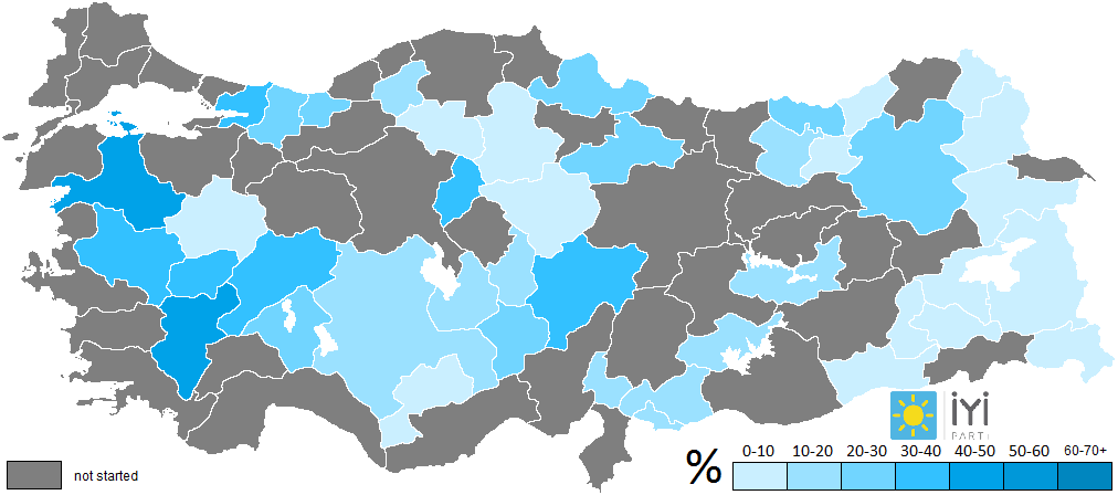 Stimmenanteile der Bürgermeisterkandidaten von der IYIPARTI nach Provinzen.